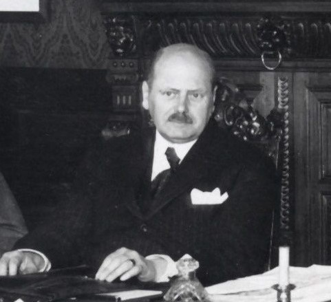 Frans Beelaerts van Blokland (1872-1956), Nederlands politicus